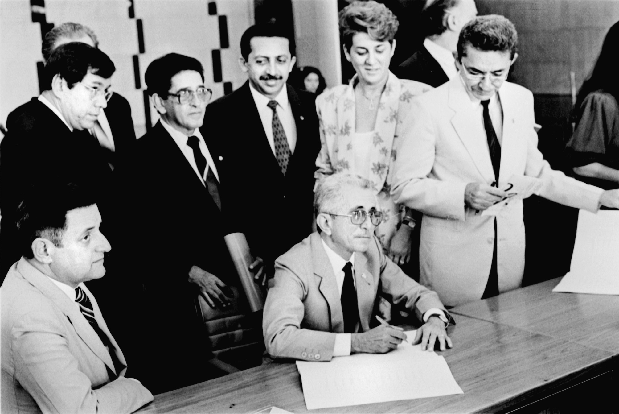 Assinatura da Constituição em 29/09/1988. Participantes - Senador Nabor Junior. Foto: Célio Azevedo